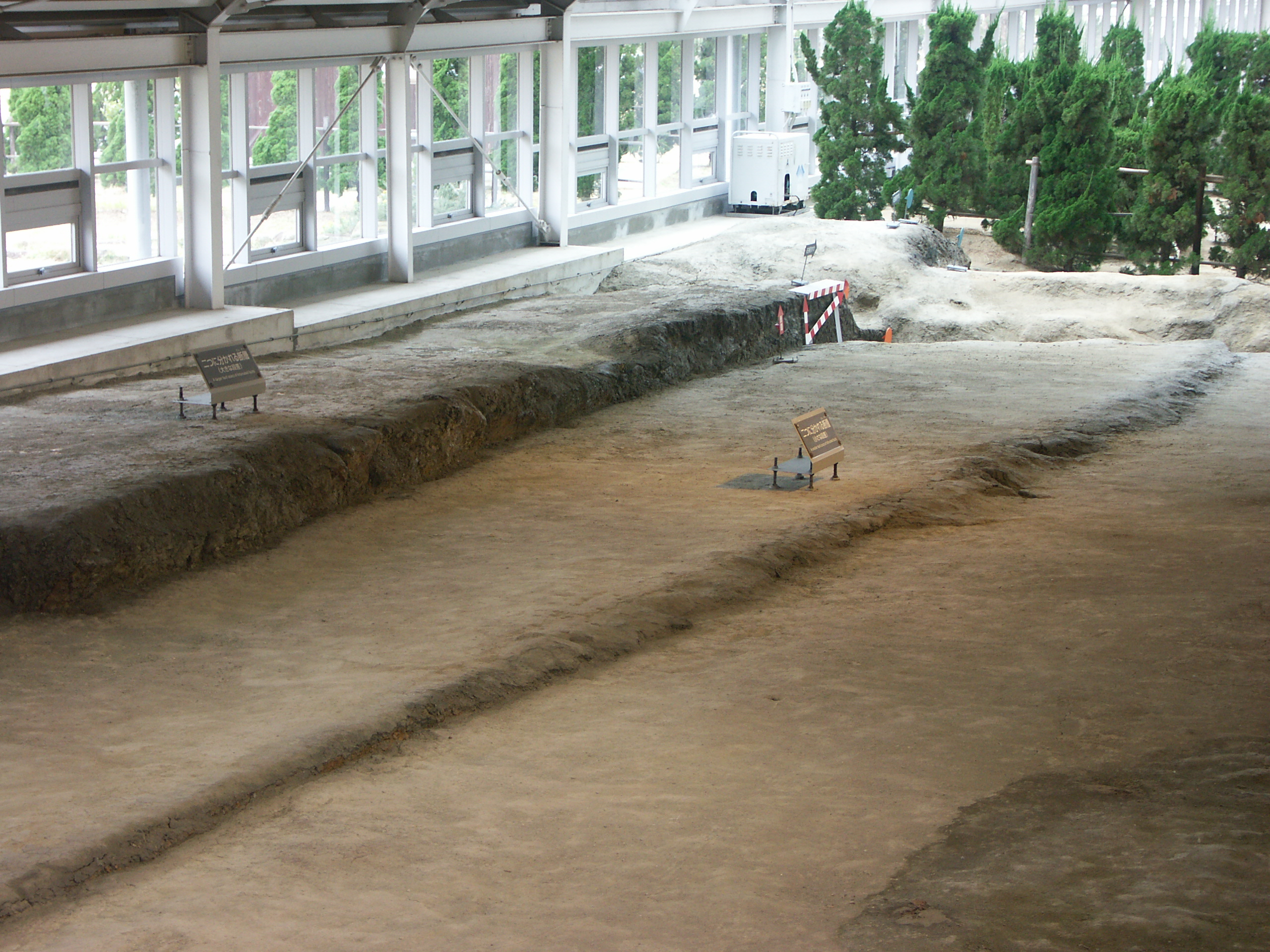 Photographie de la trace de la faille apparue lors du séisme de Kobé (Japon) en 1995, préservée dans le musée "Awaji Island Nojima Fault Preservation Museum"